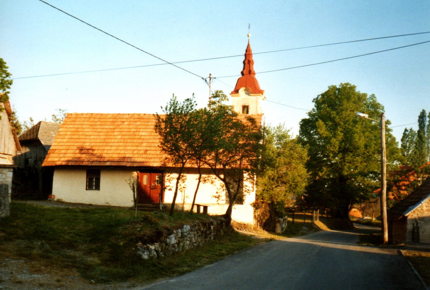 Blick von Kast 5 auf nach Osten